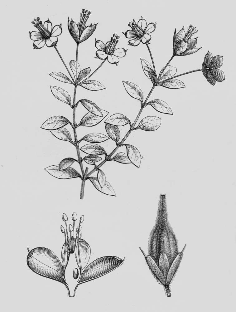 Rhynchotheca spinosa / Rhyncotheca spinosa